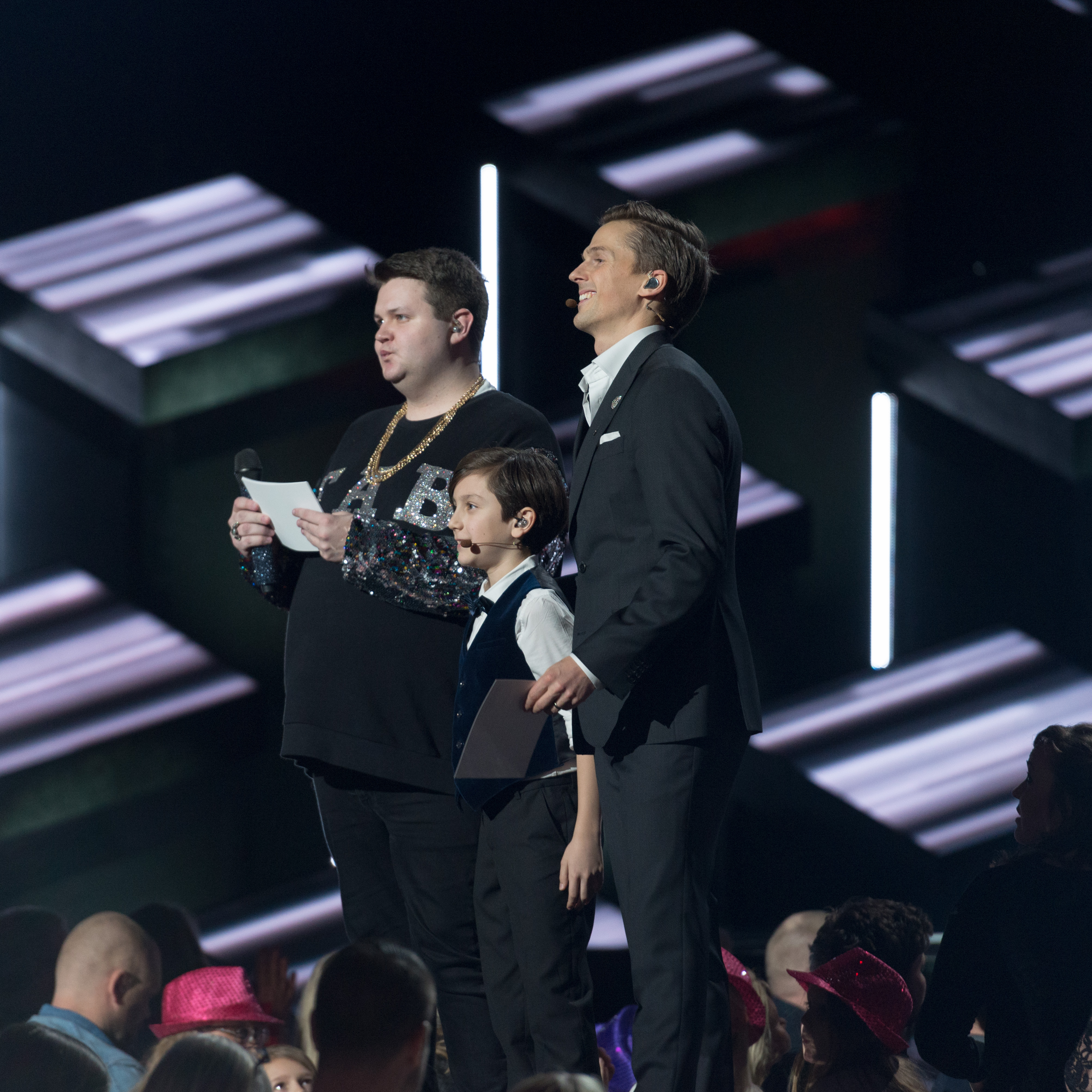 David Lindgren och Fabulous Fredrik i säger hej då från Malmö.